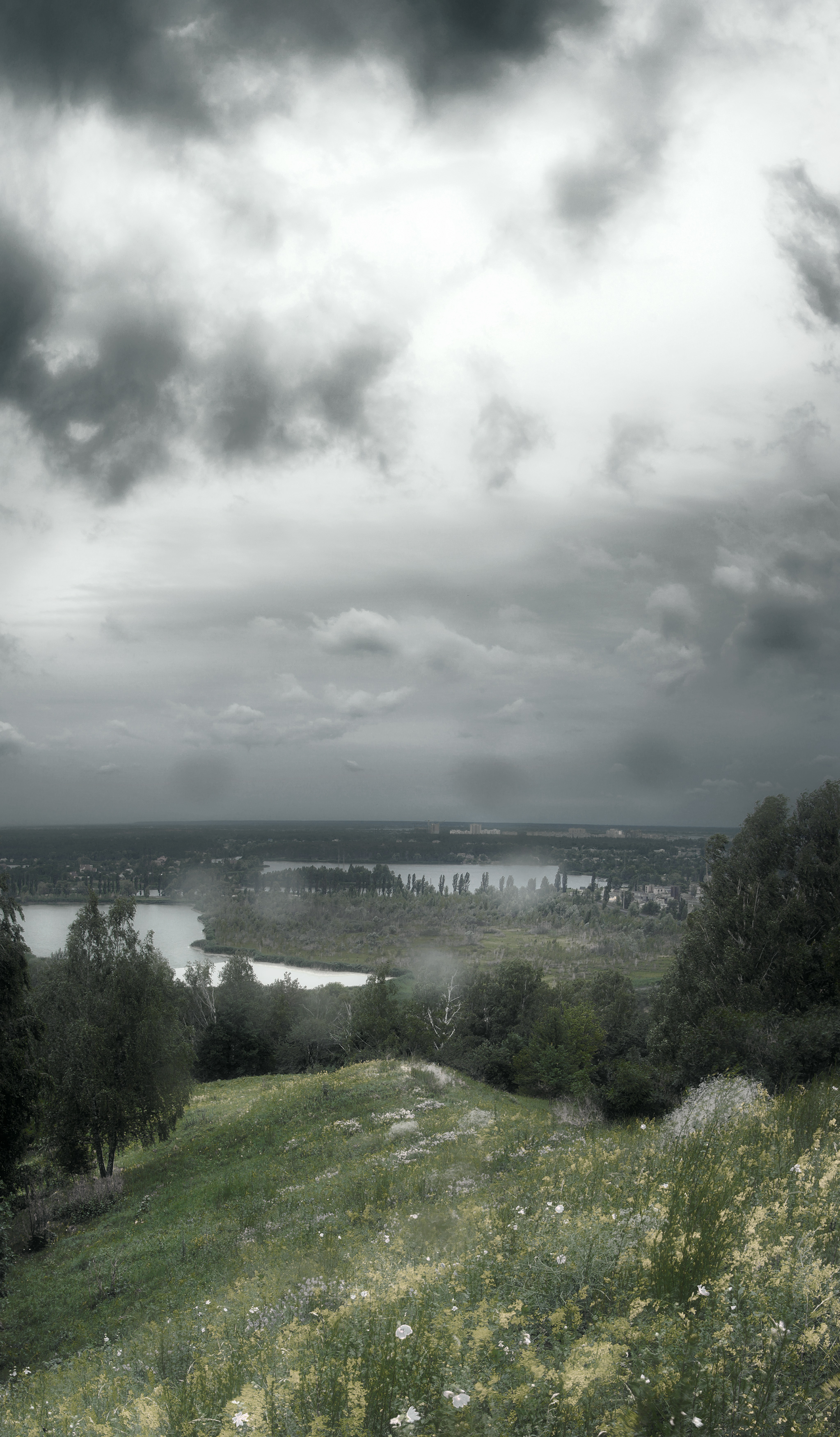 «Стугна», Обухівський район, Українська міська рада